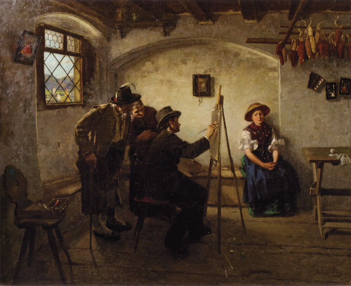 Albin Egger-Lienz: Der Porträtmaler auf dem Lande, 1891. Öl auf Leinwand, 140,8 x 175,6 cm. Bezeichnet rechts unten: A. Egger Lienz 91. "Vermittlung Prof. Dr. Rudolf Leopold